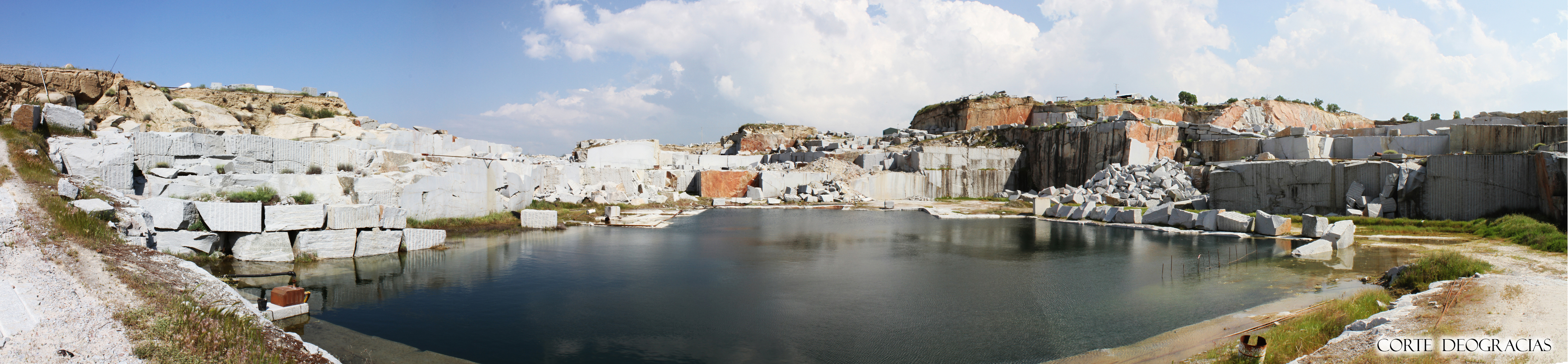 Cantera de la familia Deogracias, Quintana de la Serena, provincia de Badajoz, Extremadura, España.